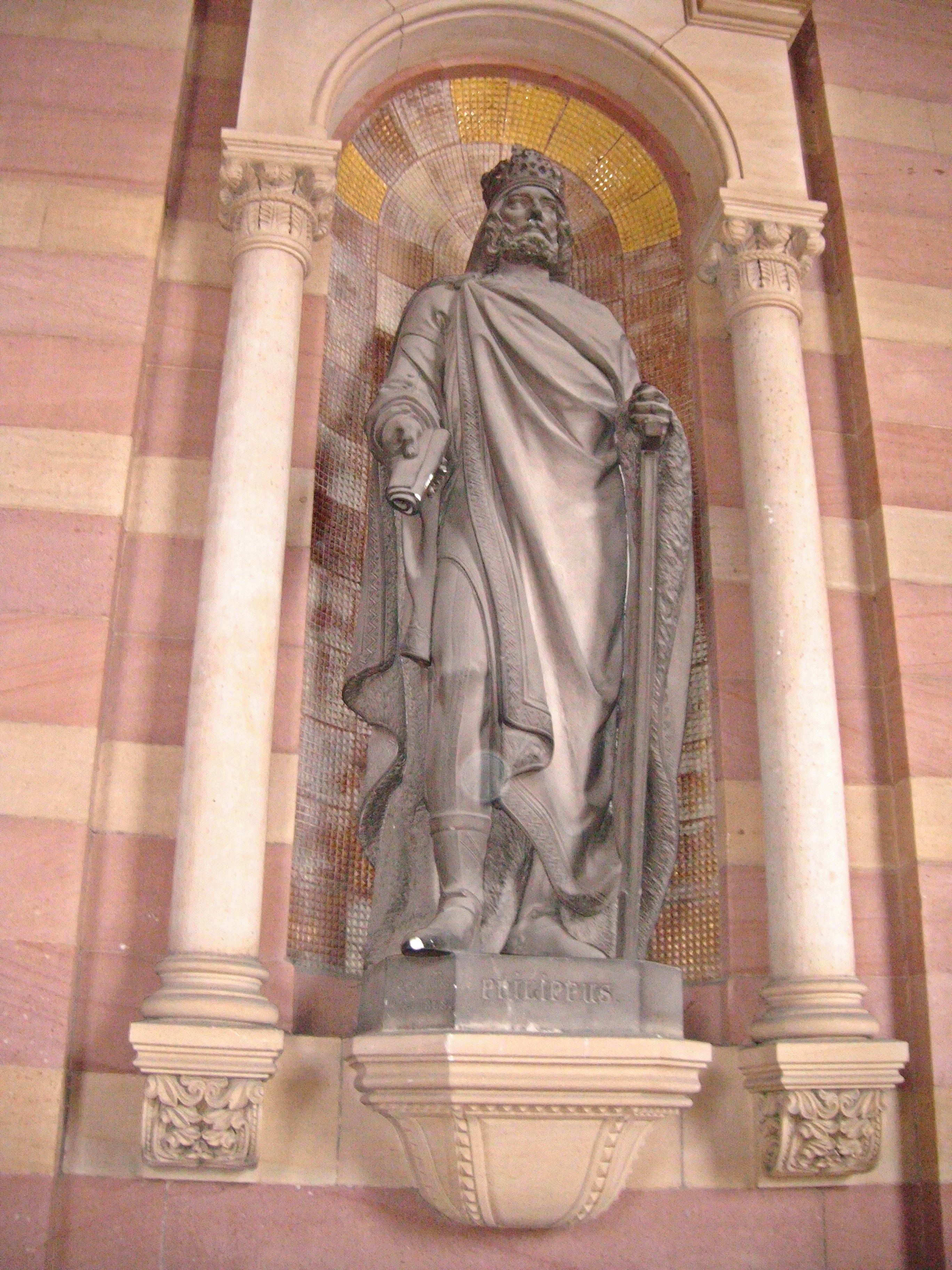 Anton Dominik Fernkorn (1813-1878); Großstatue des Königs Philipp von Schwaben, im Speyerer Dom, 1858